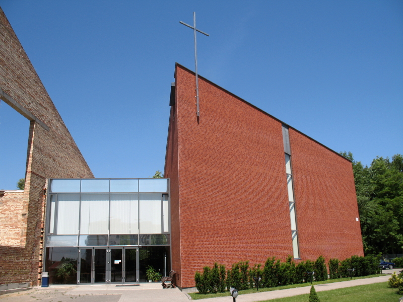 Gerojo Ganytojo bažnyčia, Kaunas.